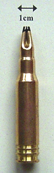 Übungsmunition der deutschen Bundeswehr, Aufschrift 7.62x51 MEN-79-9 zur Verwendung mit dem Manöverpatronengerät im MG3. Die Messingübungsmunition wird aus Kostengründen in der Regel nicht für das G3 ausgegeben, sondern nur für das MG3. Dort sind die Kunststoff Manöverpatronen nicht verwendbar, weil sie sich durch die größere thermische und meachanische Belastung zu stark verformen.